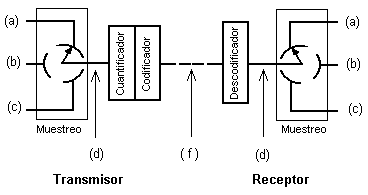 Este esquema ha sido dibujado por PACO Sistema de modulación por impulsos codificados